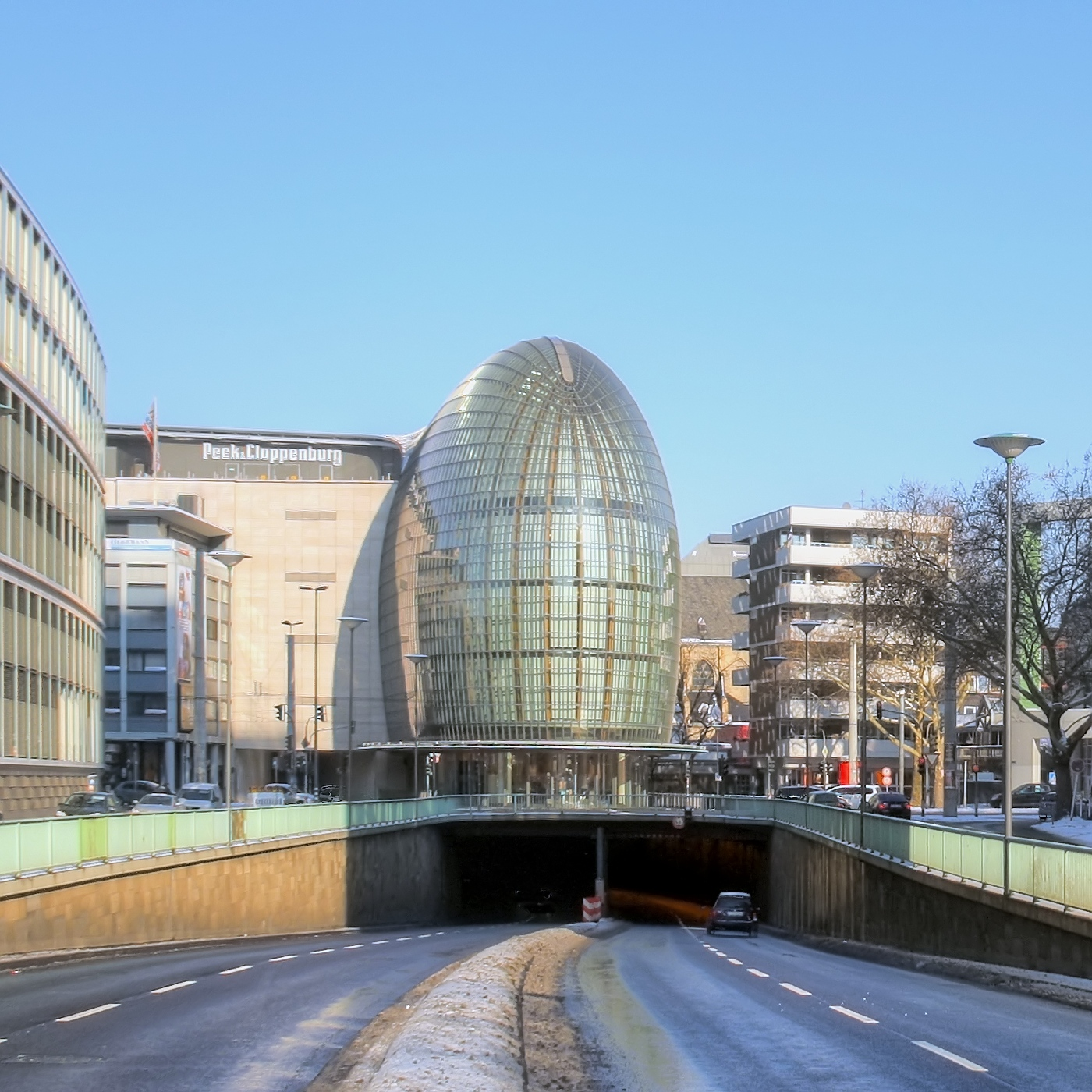 Weltstadthaus in Köln. Unter dem Haus, in dem Peek & Cloppenburg ein Modegeschäft betreibt, verläuft die Nord-Süd-Fahrt. Architekt: Renzo Piano